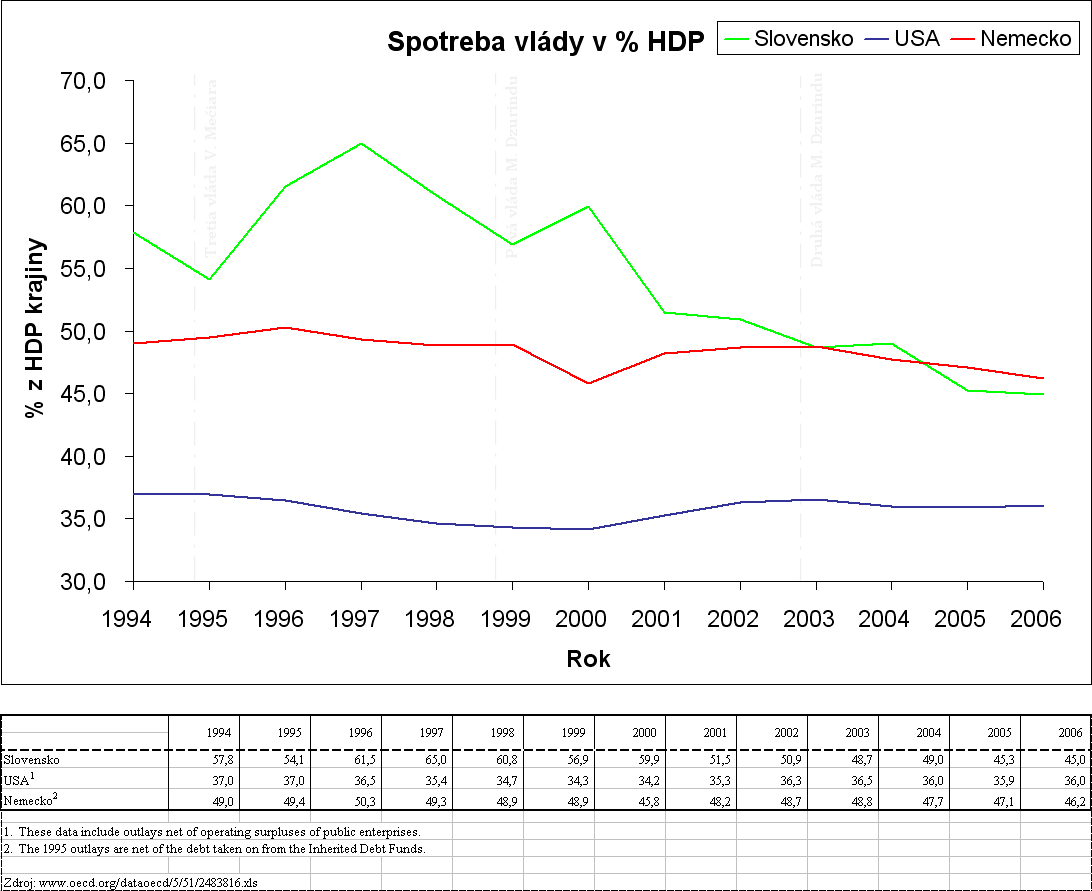 Popis: Spotreba vlády SR v porovnaní s Nemeckom a USA v rokoch 1994 až 2006 Zdroj: vytvorené na základe údajov OECD Dátum: 6. september 2005 Autor: Ondrejk Povolenie: PD Iné verzie tohto súboru: nie